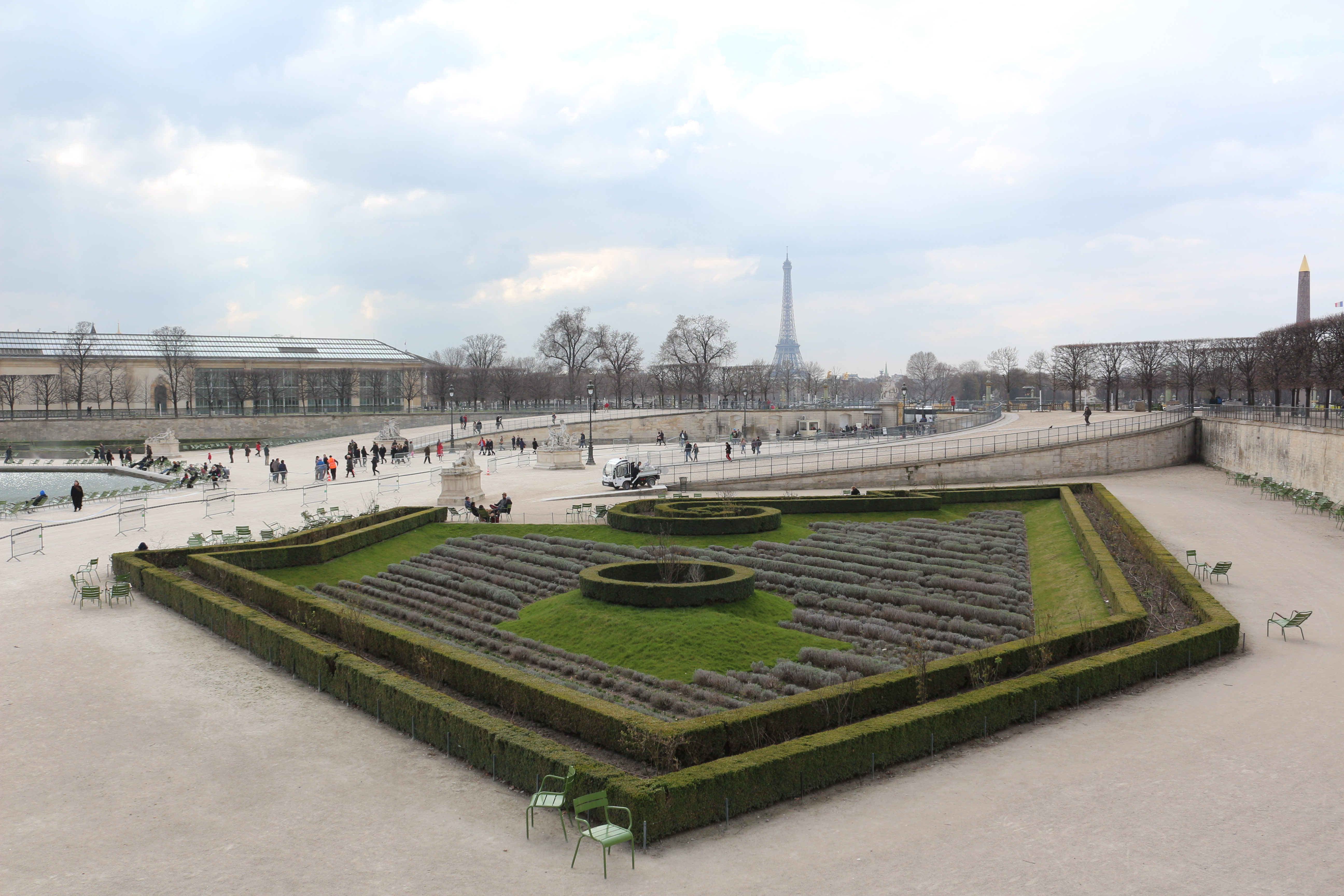 Blick über den oberen Bereich des Jardin des Tuileries in Richtung Place de la Concorde im März 2015